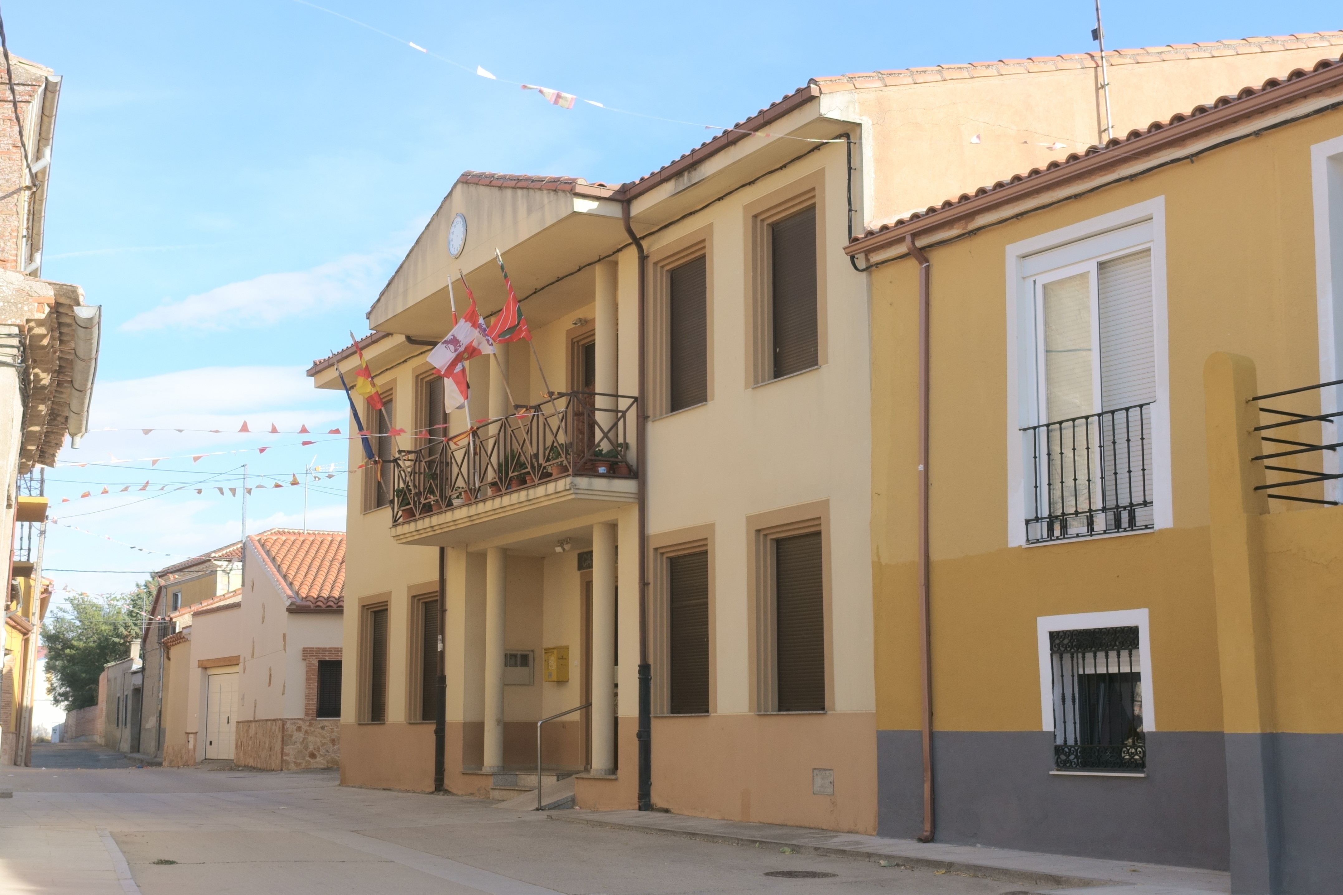 Casa consistorial de Malva (Zamora, España).